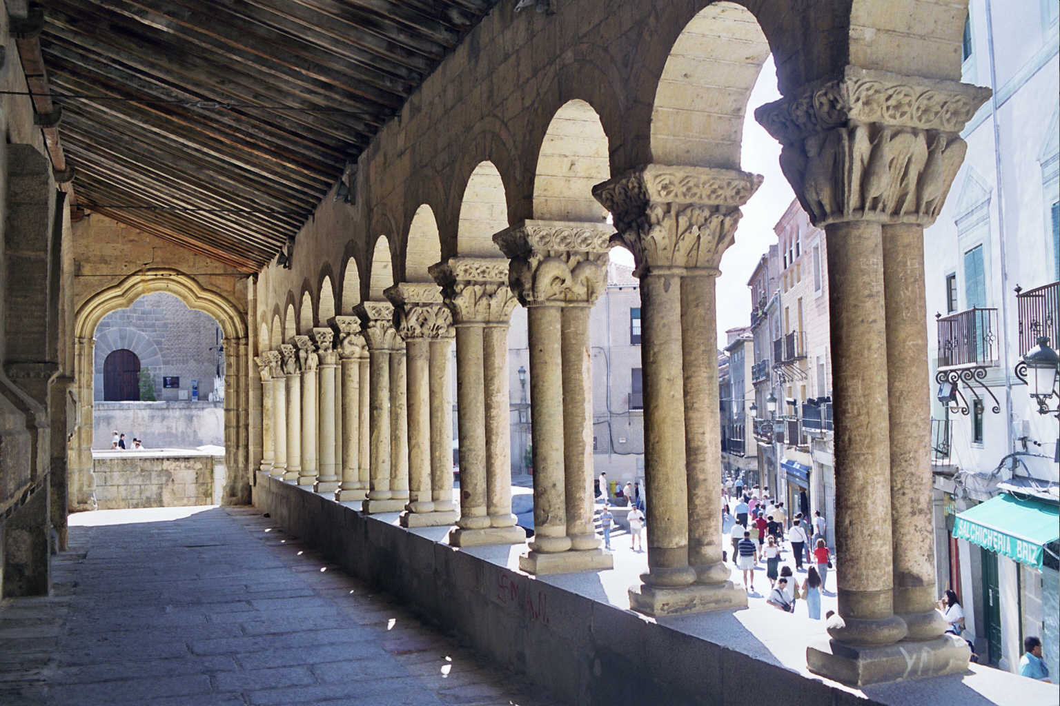 Segovia. (Castilla-León. España) Iglesia de San Martín. Siglo XI.Pórtico. Fotografía realizada el 22 agosto de 2002 por el autor.User:Pelayo2